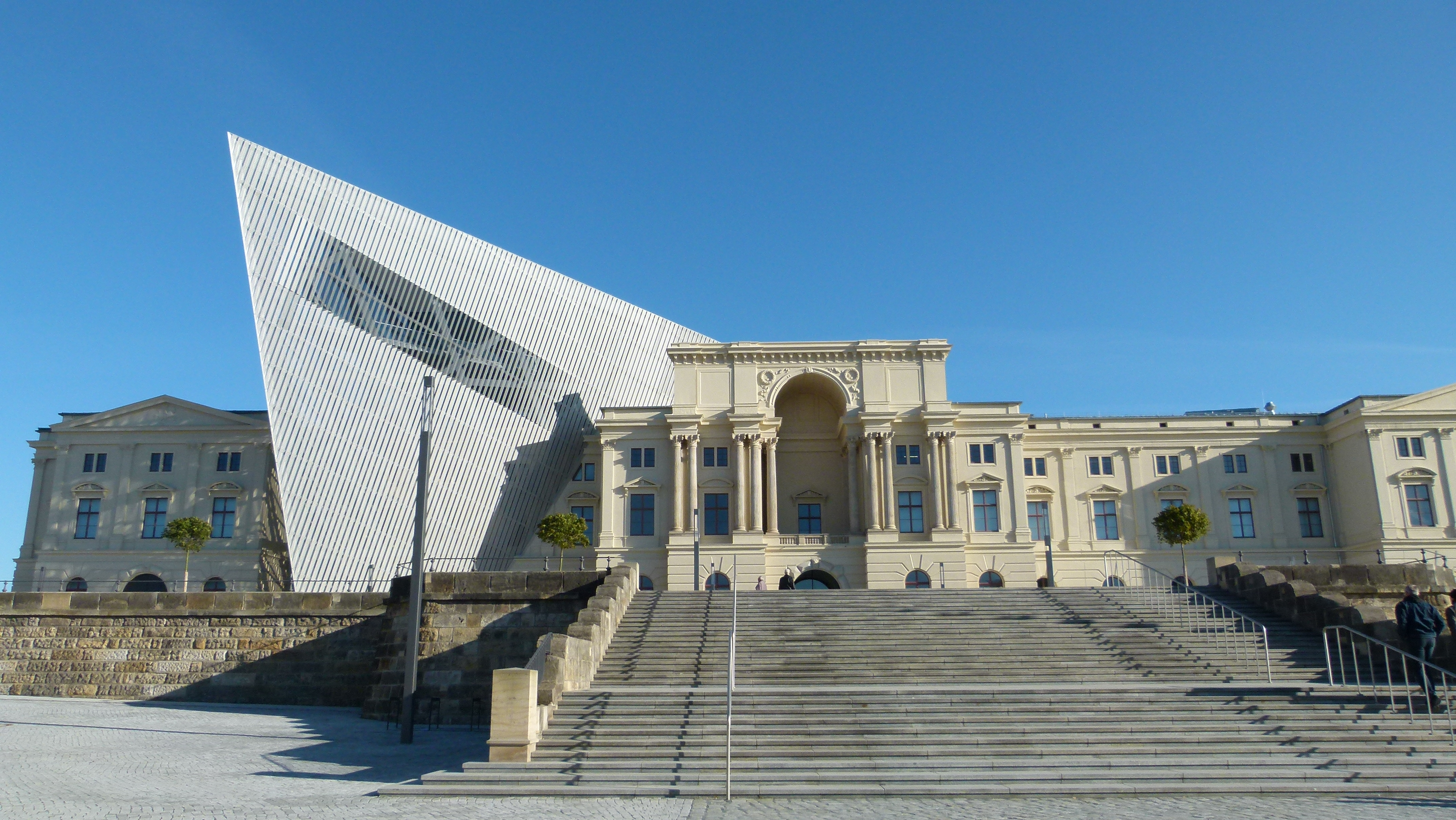 Außenansichten, Militärhistorisches Museum der Bundeswehr, Olbrichtplatz 2, Dresden